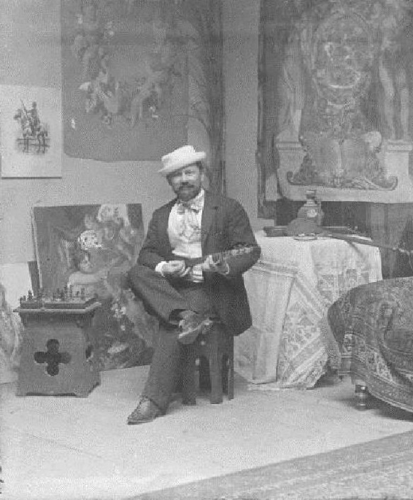 Karel Žádník v atelieru